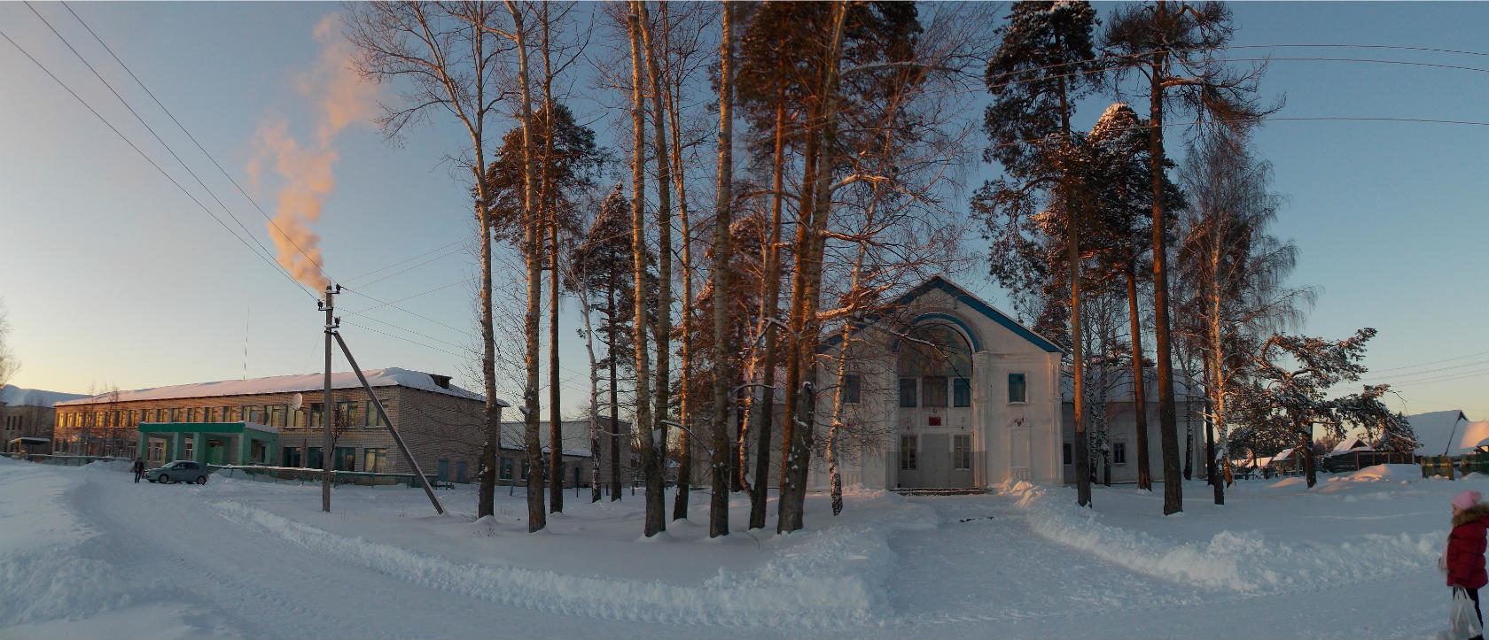 10pd12